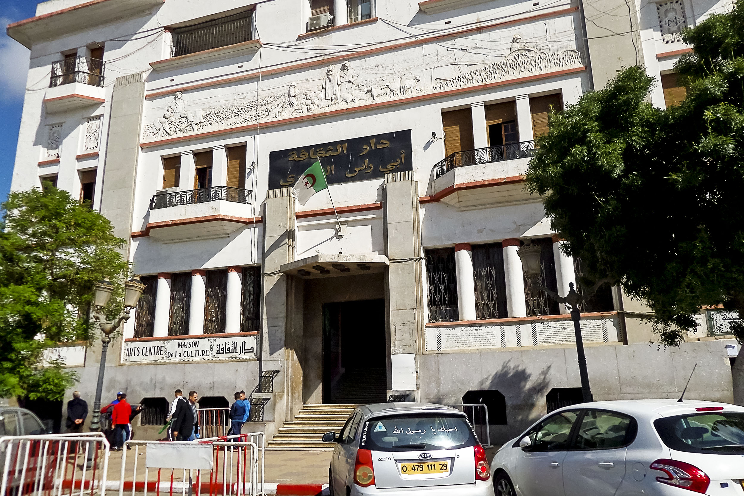 Maison de la culture - Mascara دار الثقافة - معسكر